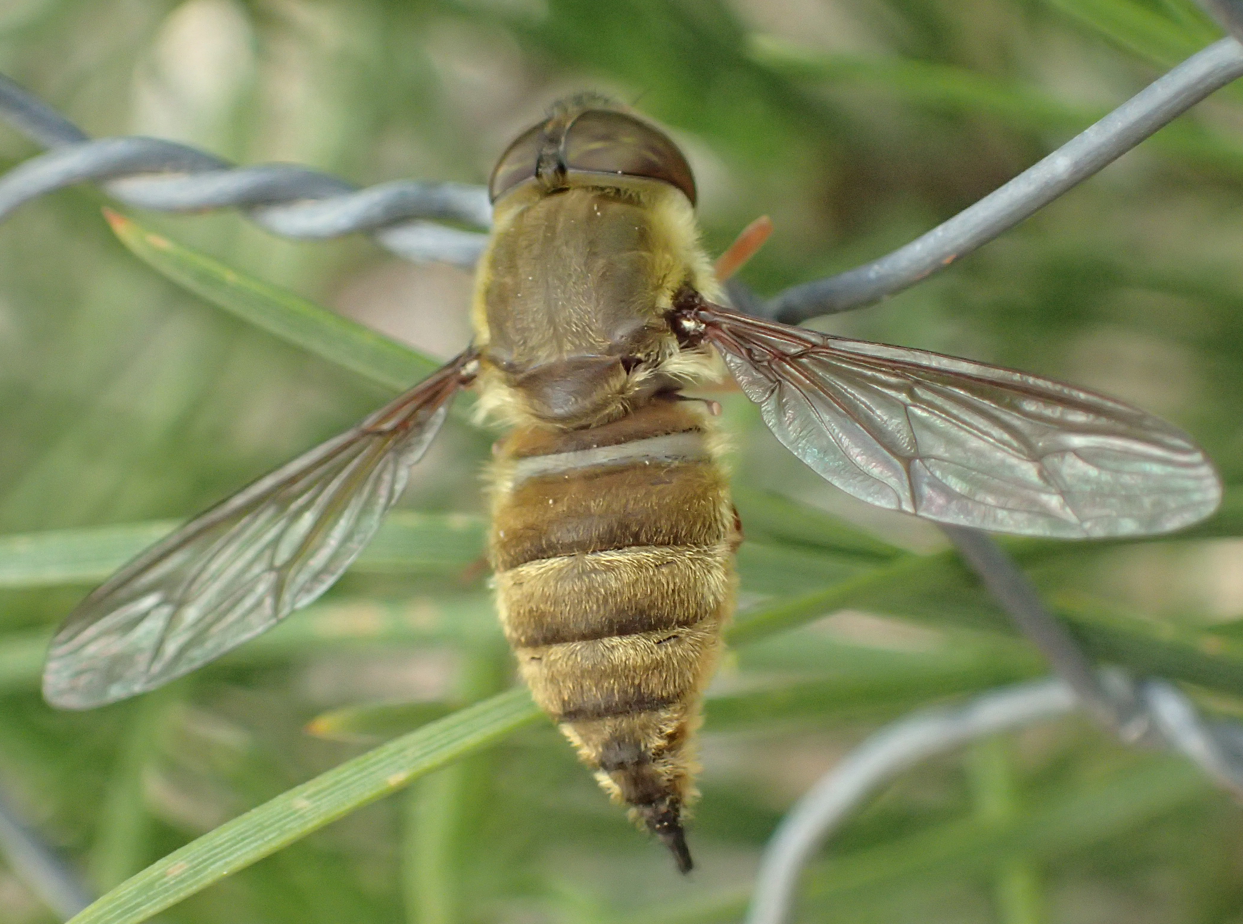 Hirmoneura obscura von Griechenland, Peloponnes, bei Sparta